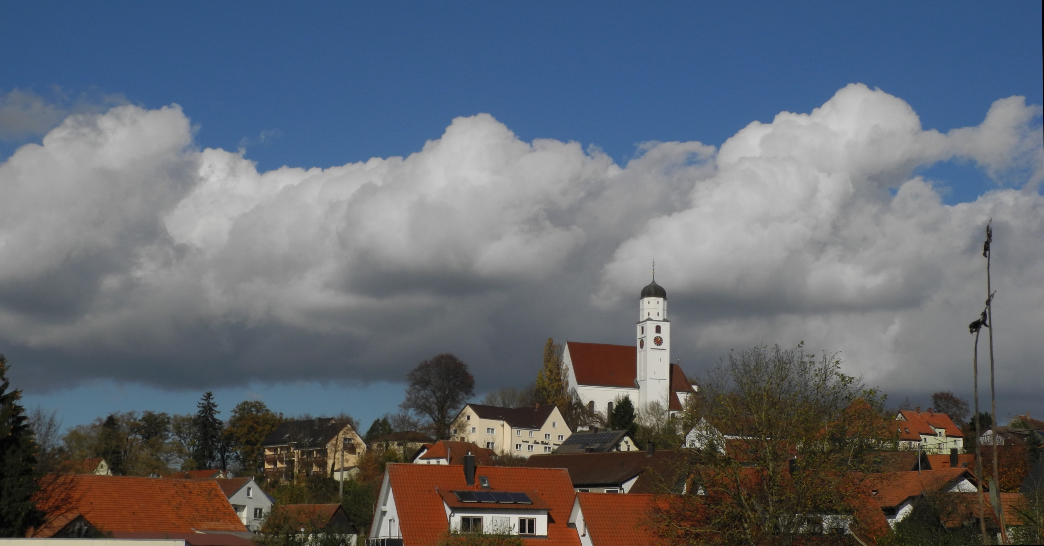 Vöhringen - Illerberg02